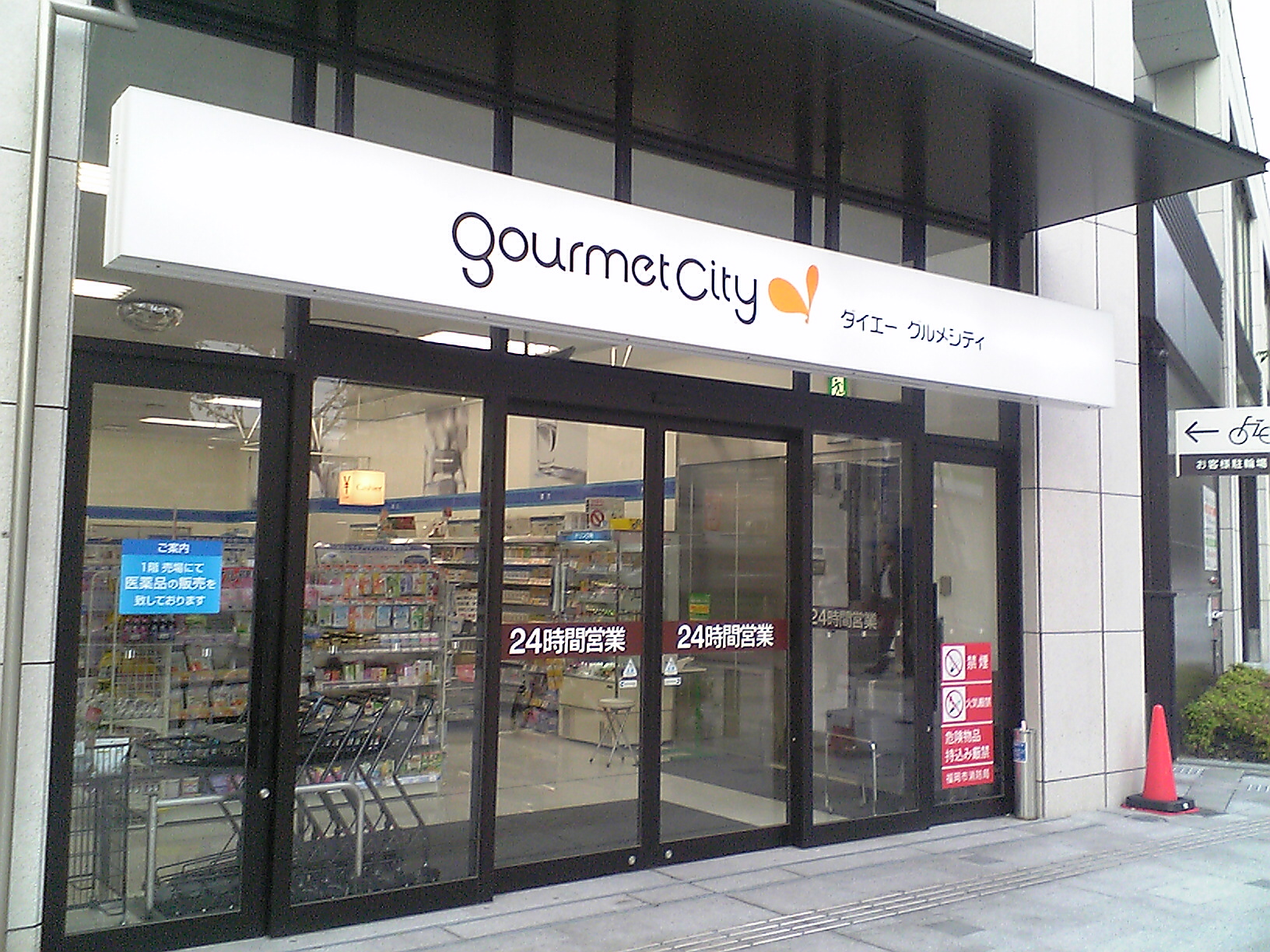 福岡市ja:博多区にあるja:ダイエーja:グルメシティ博多祇園店。 屋号は渕上呉服店→渕上デパート→丸栄本店（？）→ユニード渕上店→ダイエー渕上店→グルメシティ渕上店→改築→ダイエーグルメシティ博多祇園店となっている。